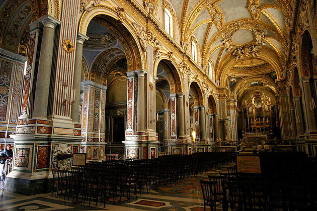 Abbazia di Montecassino, Lazio, Italia